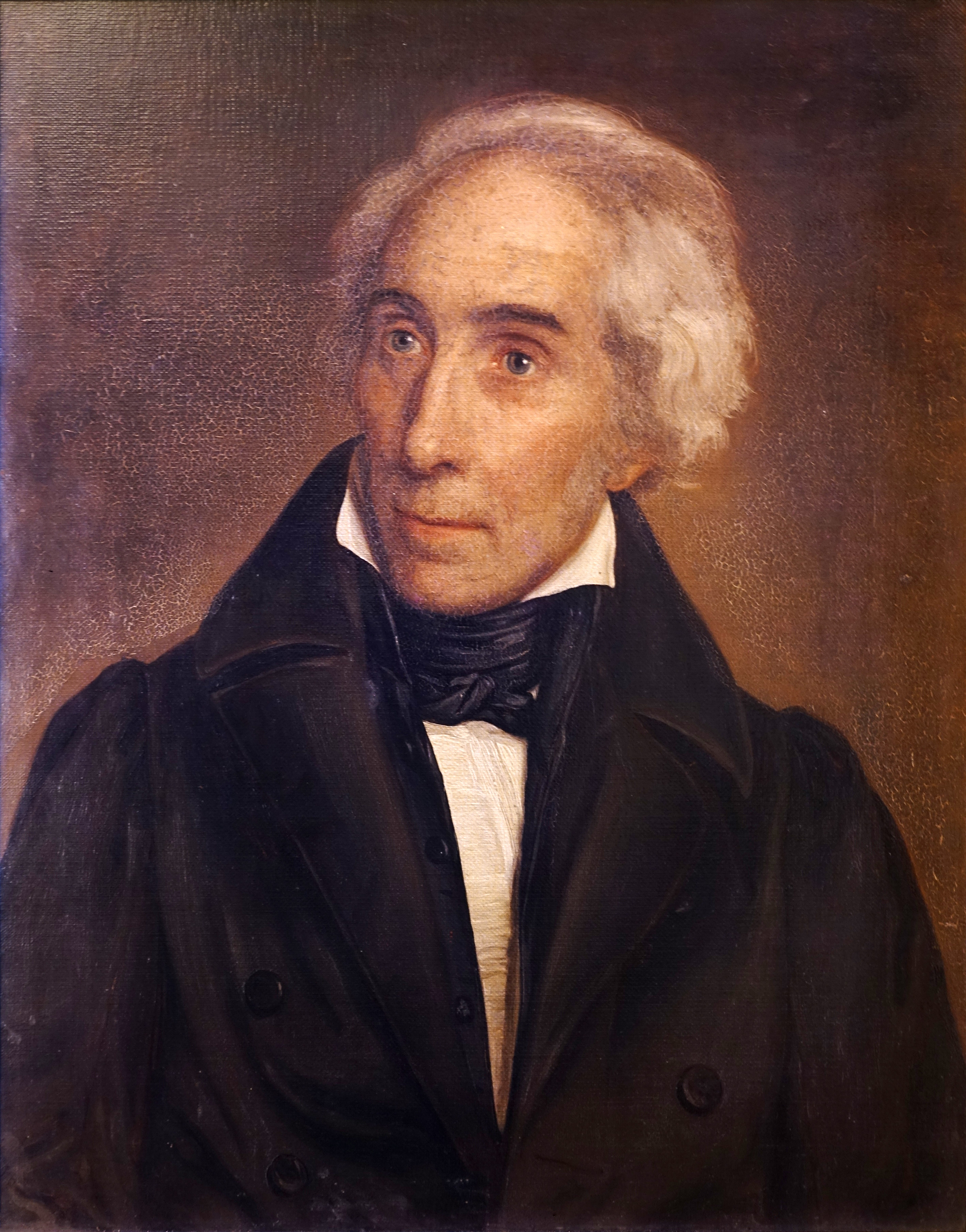 Johann Heinrich Mayr (1768–1838). Gemälde von Conrad Hitz aus dem Jahr 1836, ausgestellt im Historischen Museum Schloss Arbon (Leihgabe Historisches Museum Thurgau).